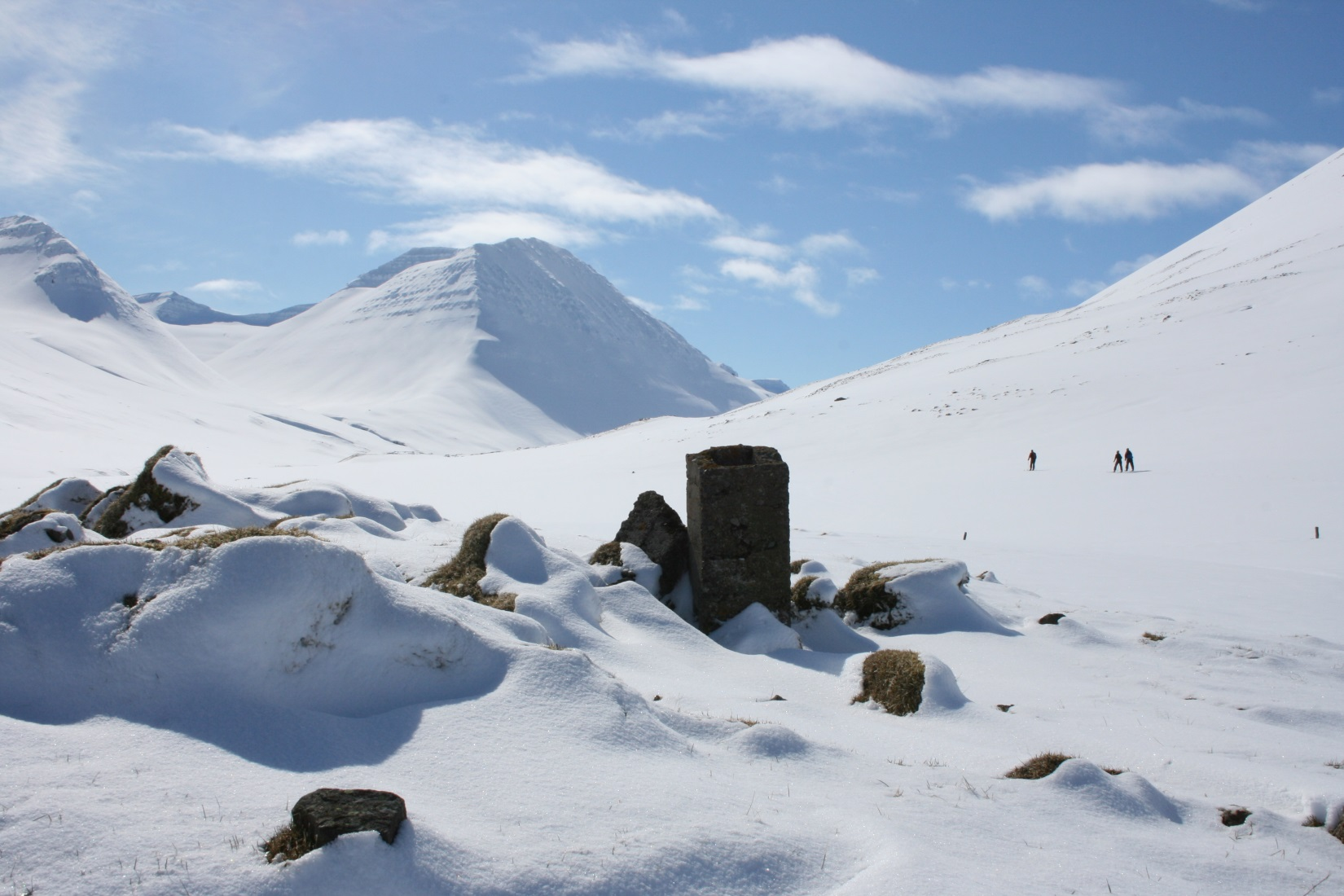 Hverhóll, eyðijörð í Skíðadal